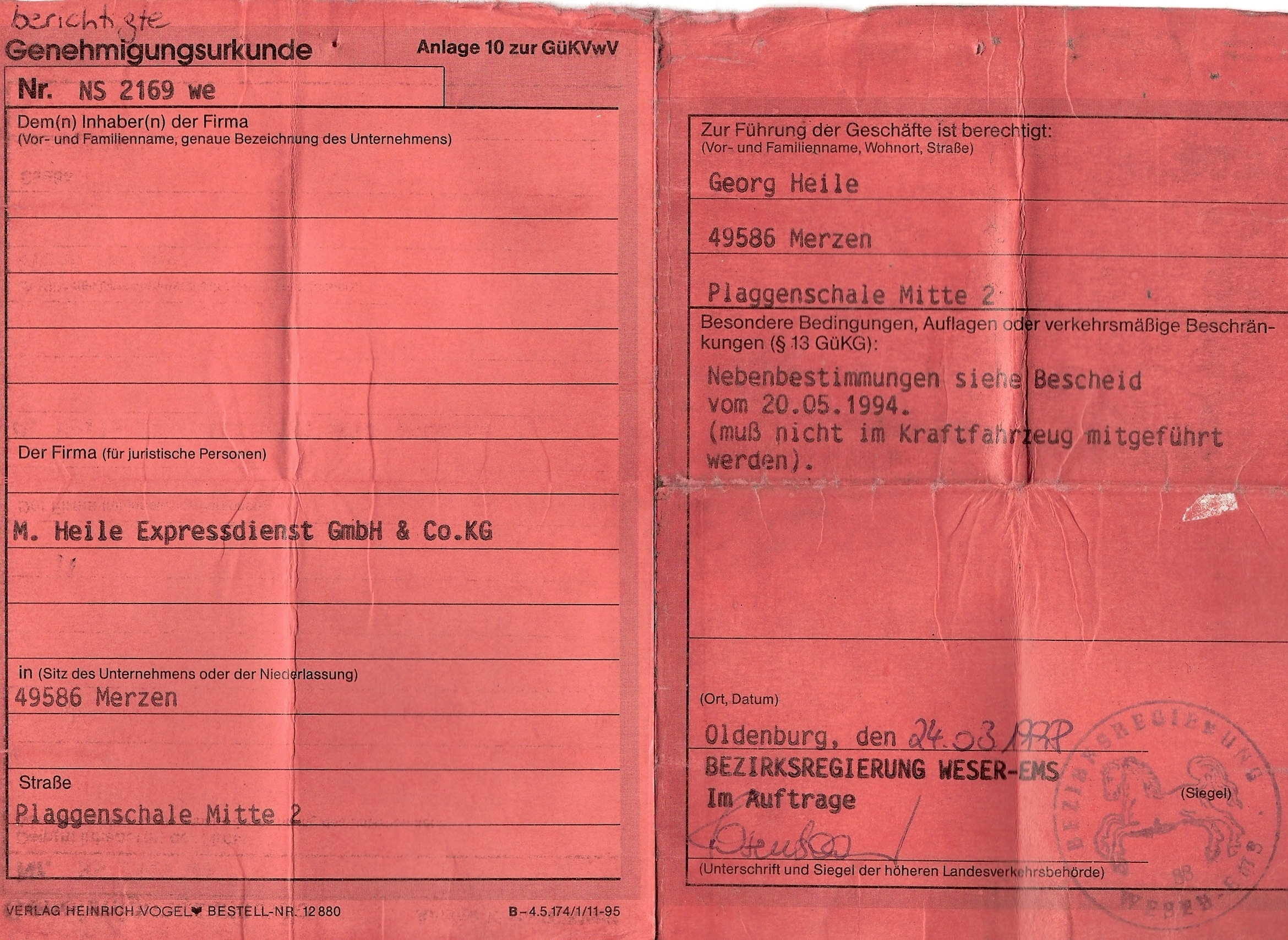 Rote Konzession bzw. Genehmigung für den Güterfernverkehr. Wurde bis 1998 noch benutzt